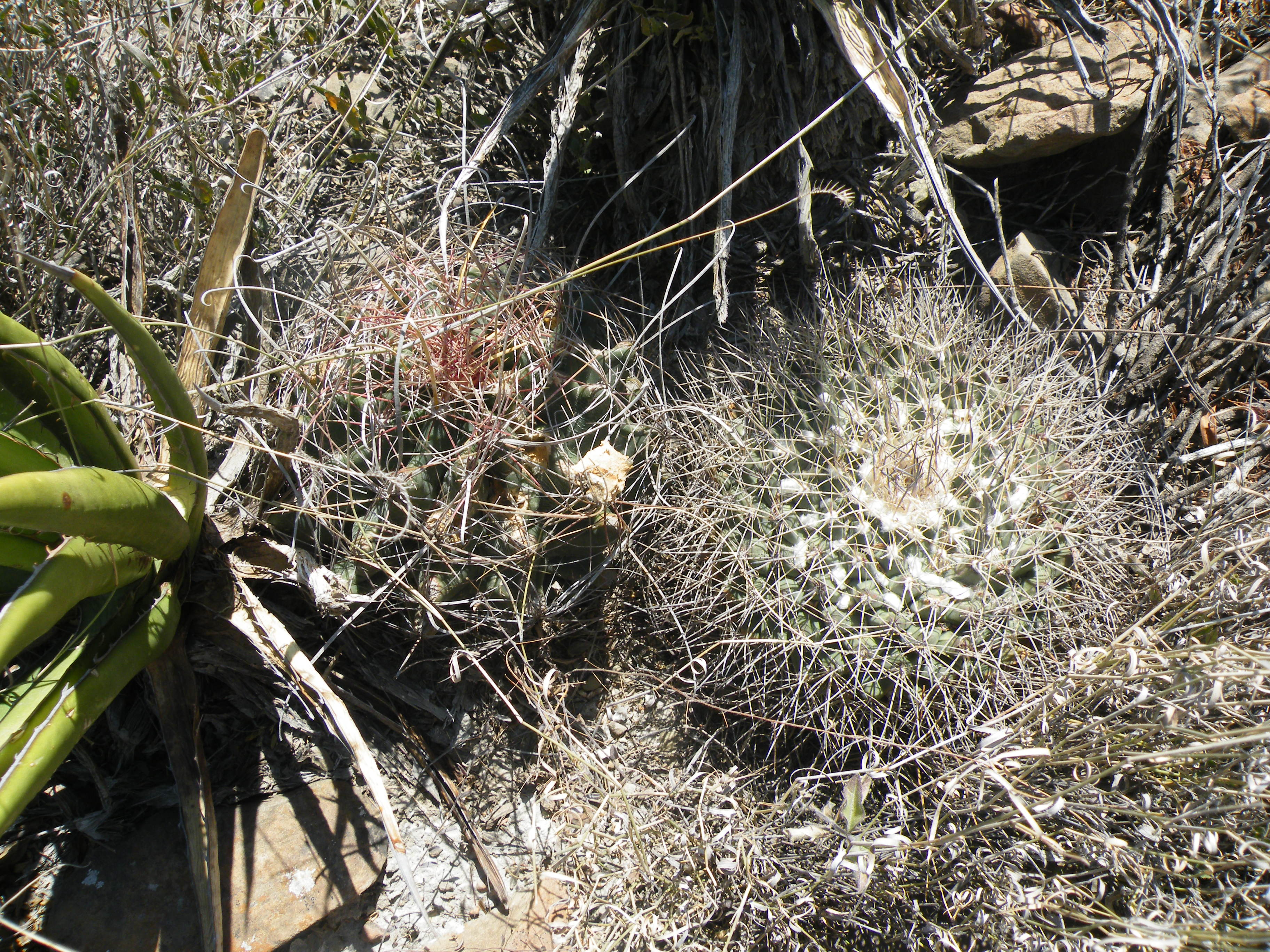 4 kms before La Gloria, Nuevo Leon